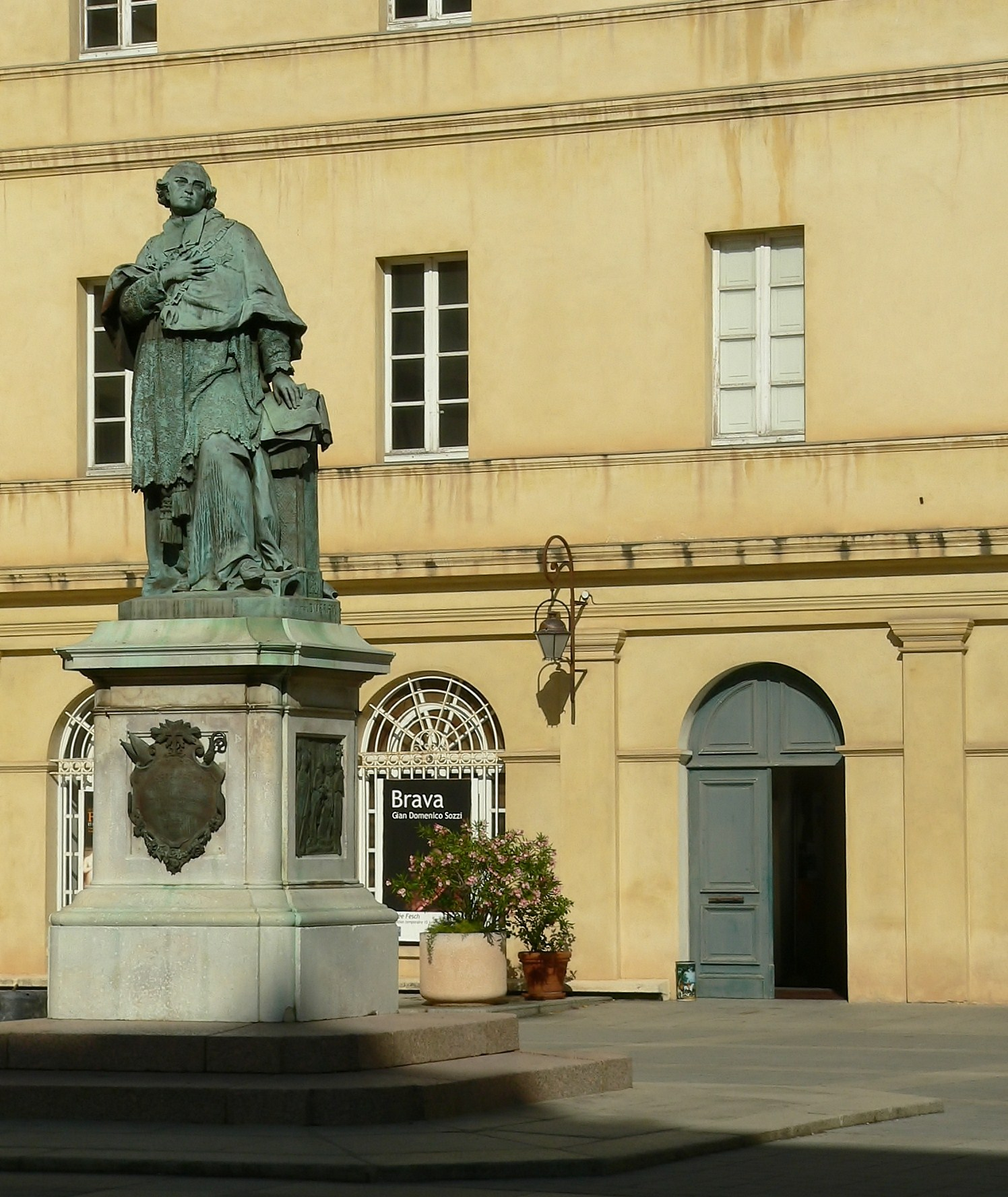 Cardinal Joseph Fesch Sculpteur : Gabriel-Vital Dubray Fonderie : Eck et Durand Date : 1856 Cour du Palais Fesch Ajaccio, Corse-du-Sud